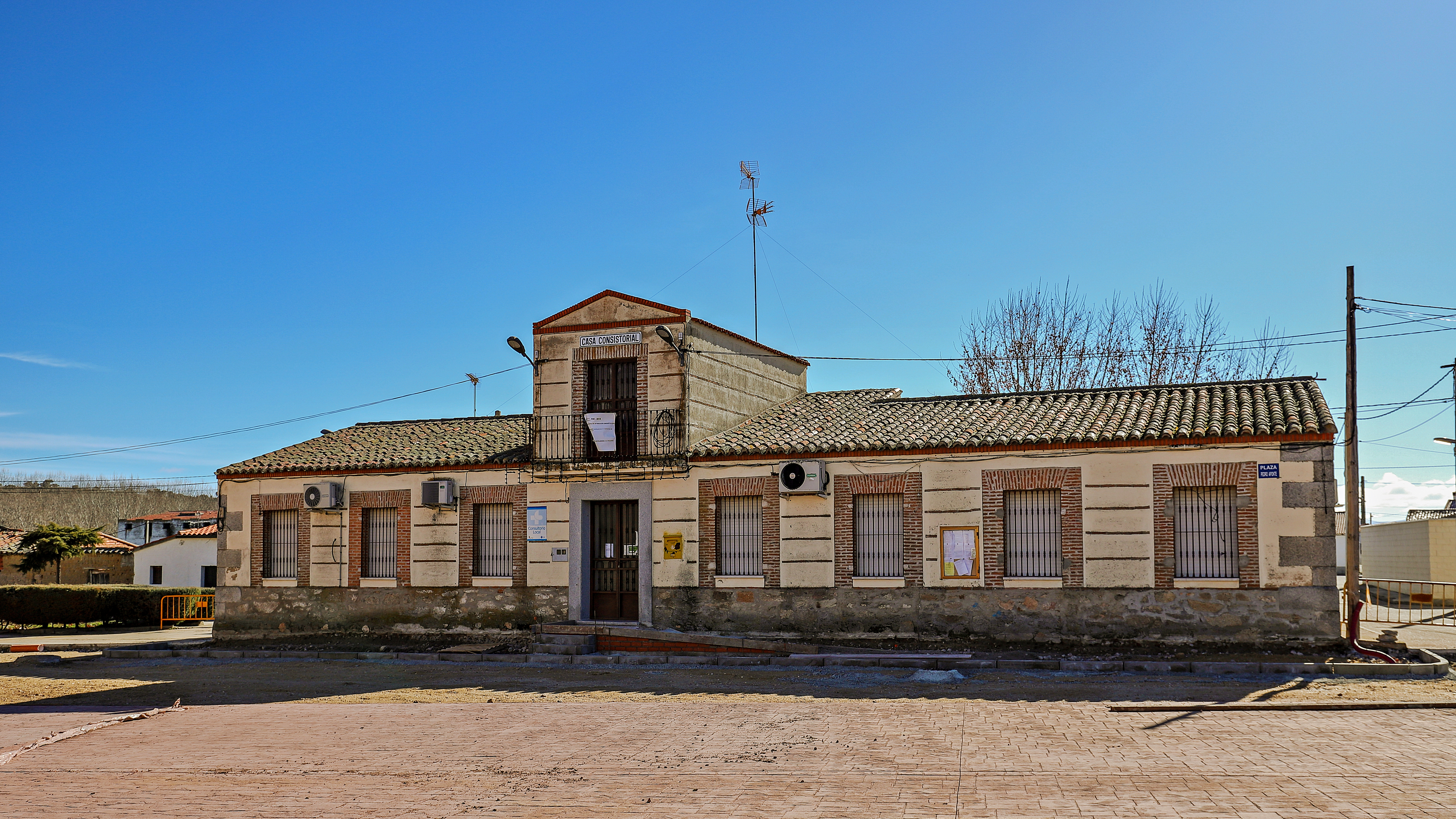 Gajates es un municipio de la comarca Tierra de Alba, en la provincia de Salamanca.